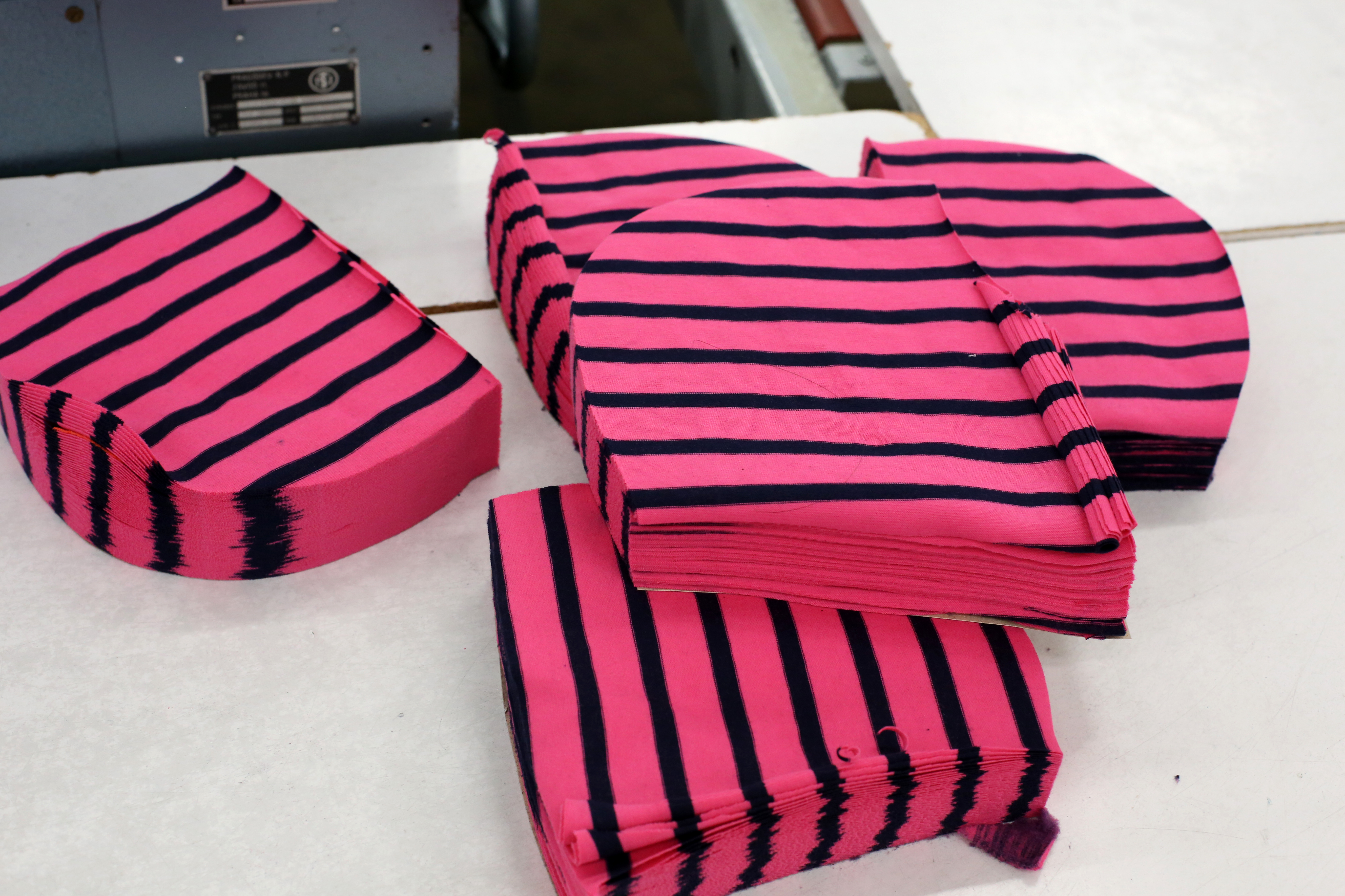 Pleas_prize